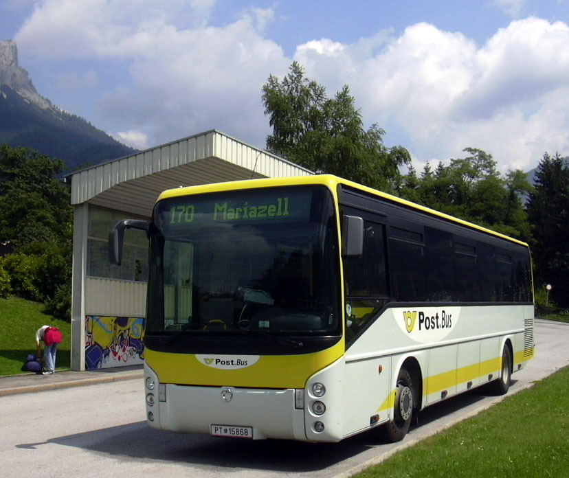 Irisbus Ares der Postbus GmbH Eisenerz, de:7. August de:2004 Linie 170 nach Mariazell. Diese Strecke wurde nur im Sommer auf ganzer Länge bedient, heute verkehren hier aufgrund der geringen Bevölkerungsdichte nur noch Rufbusse. Aufnahme: tobias b köhler